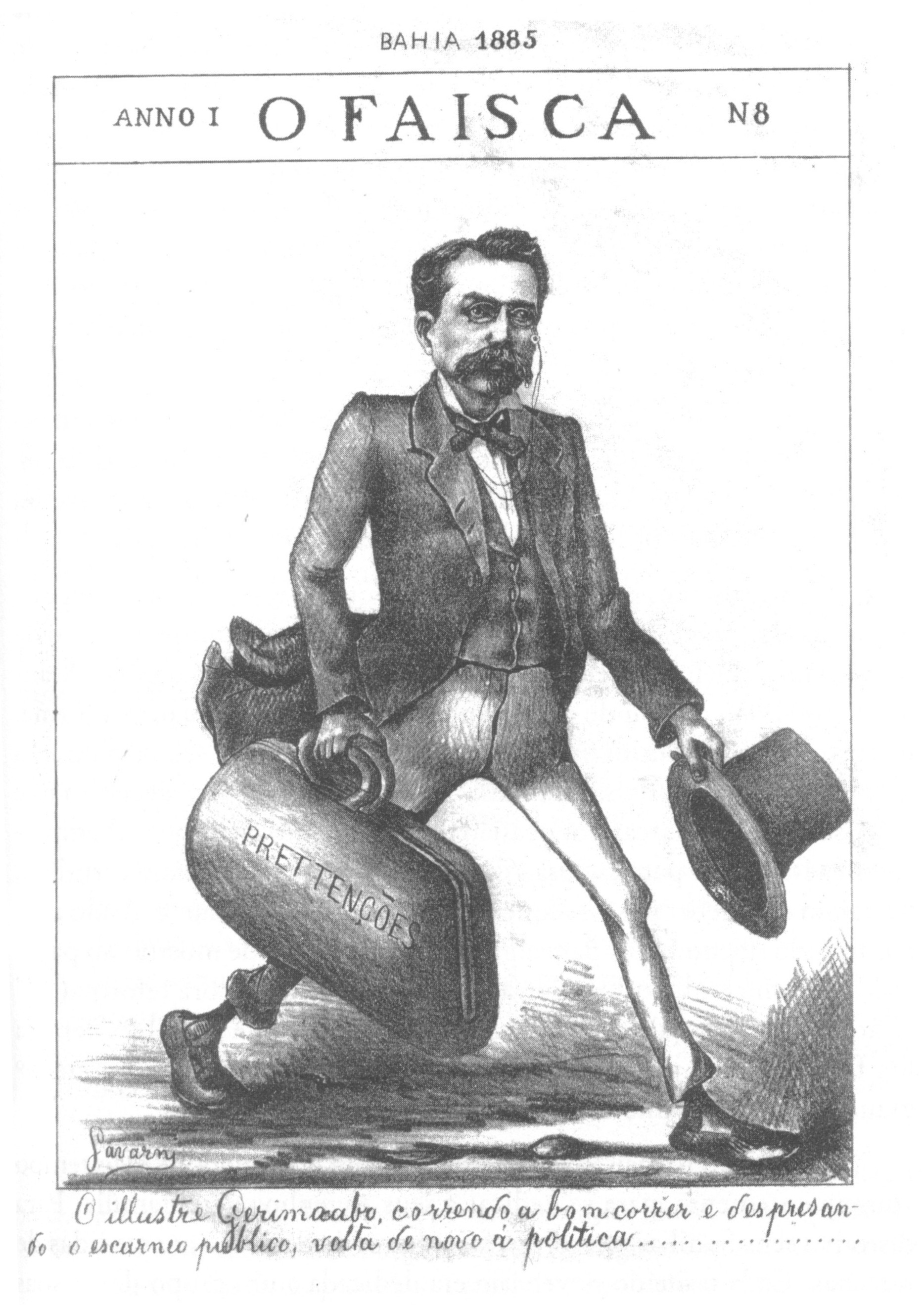 Exemplar nº8 de "O Faísca", jornal que circulou na Bahia, em 1885. A caricatura ilustra o Barão de Jeremoabo, chefe político de fins do Império e começo da República.